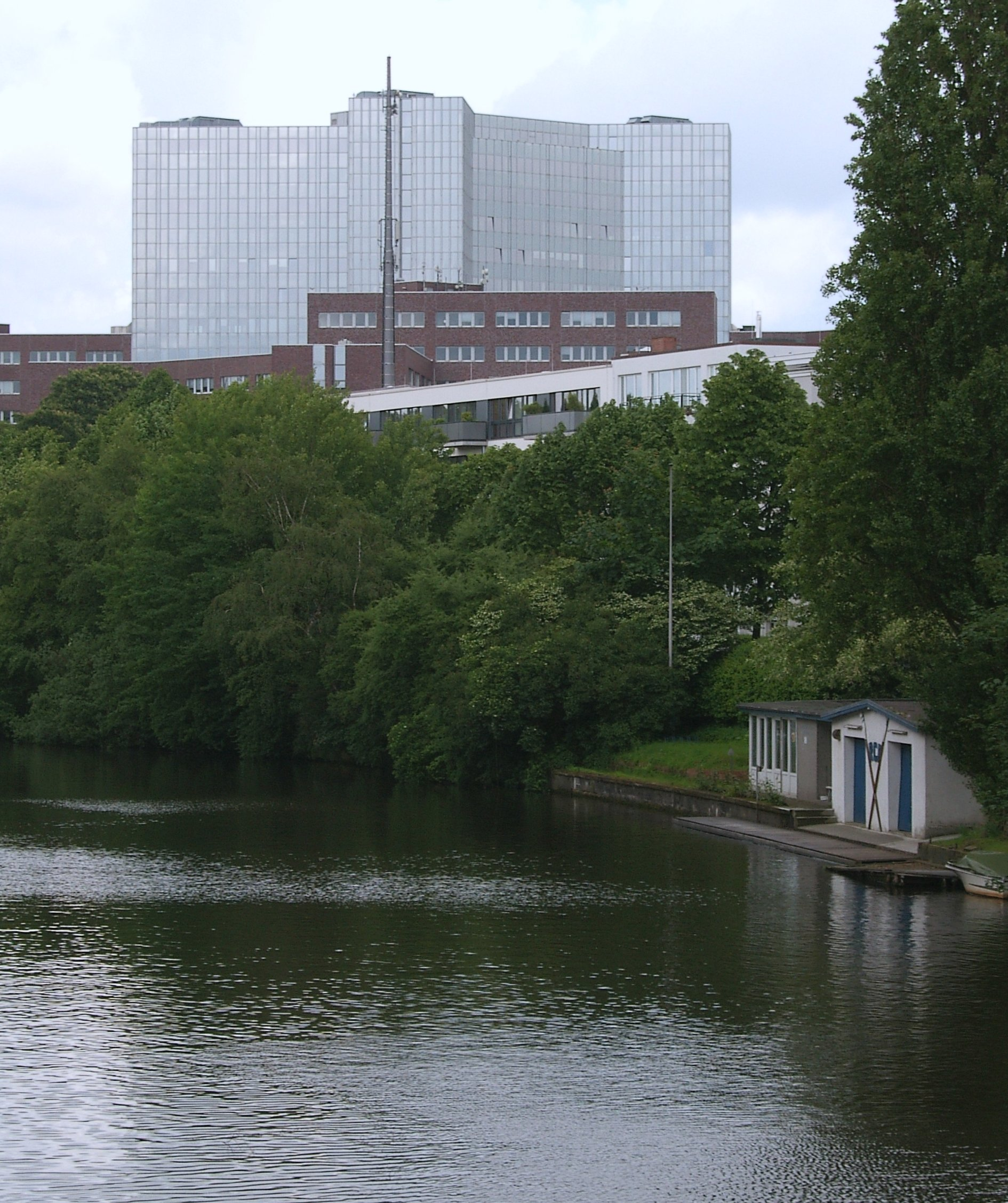 Hamburg, Osterbekkanal, Alstercity